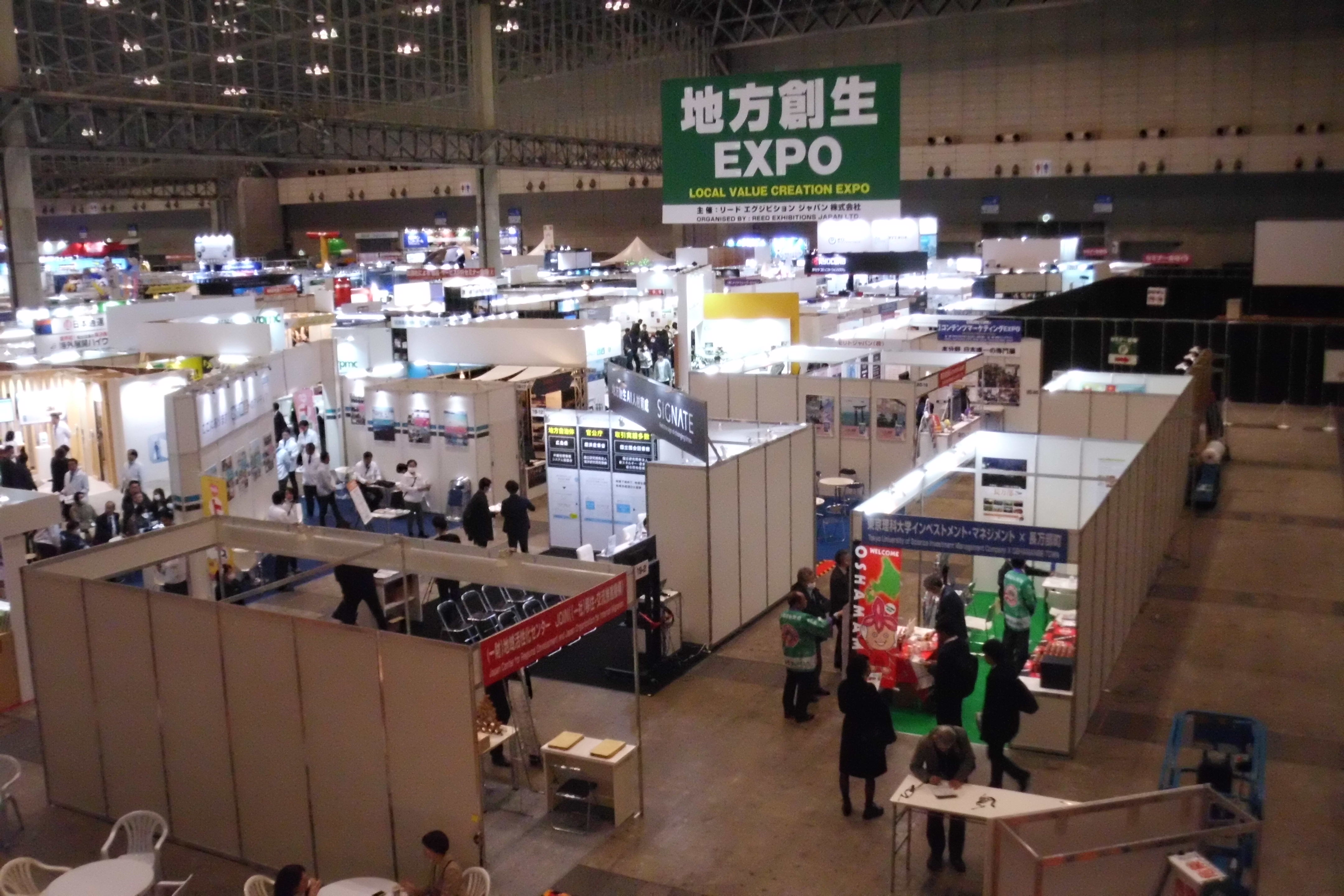 2020年2月5－7日に幕張メッセで開催された地方創生エクスポ